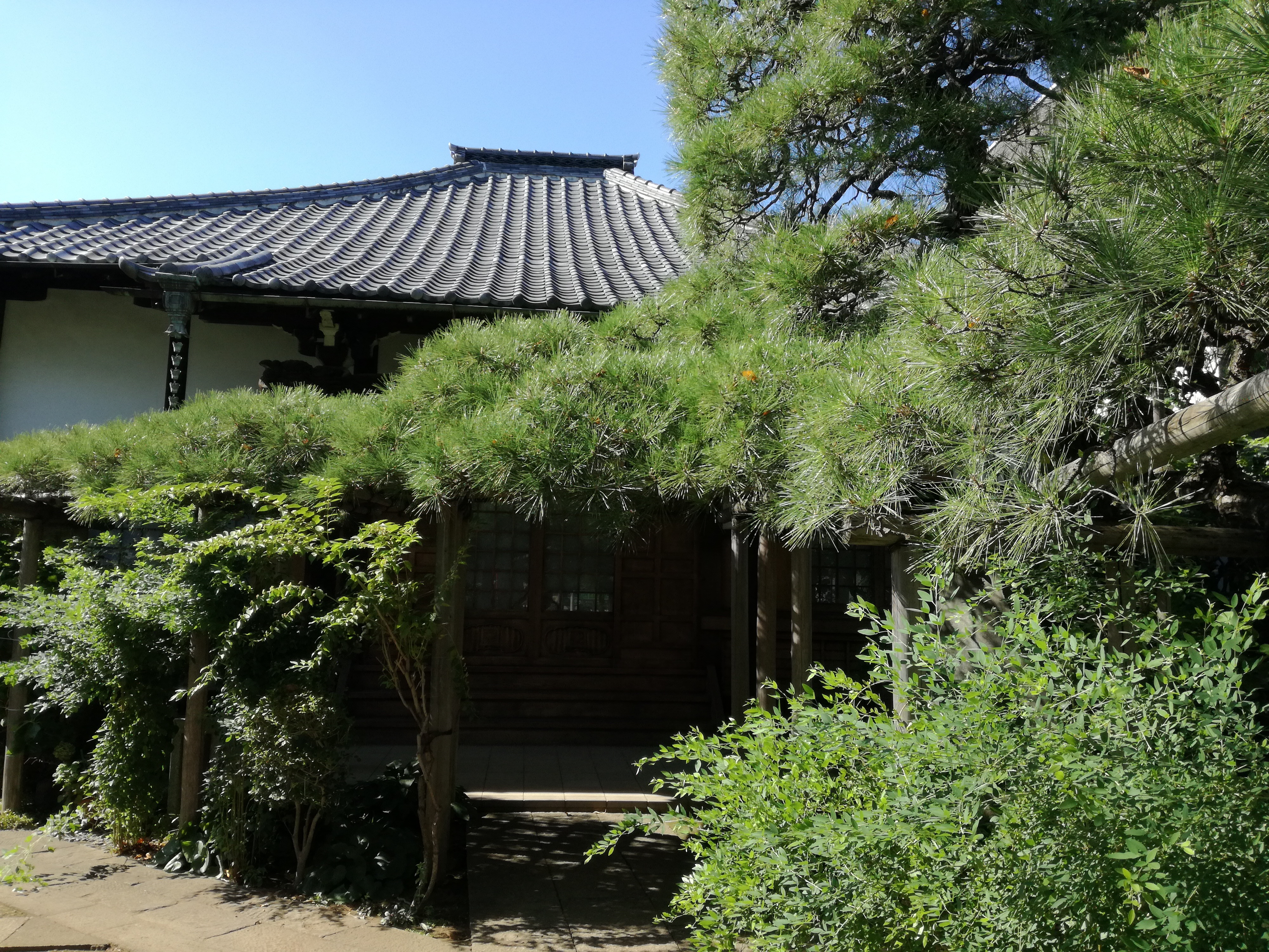 hondo